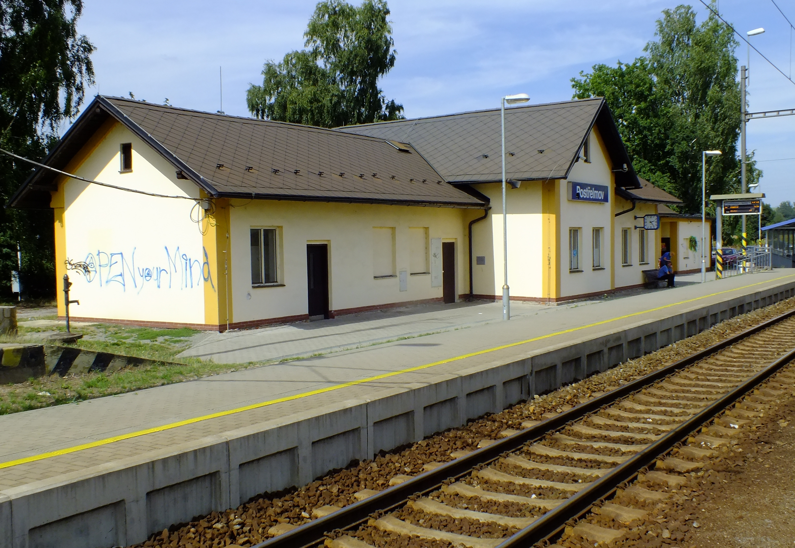 Staniční budova